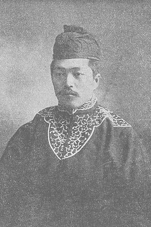 篠田治策（1872-1946）